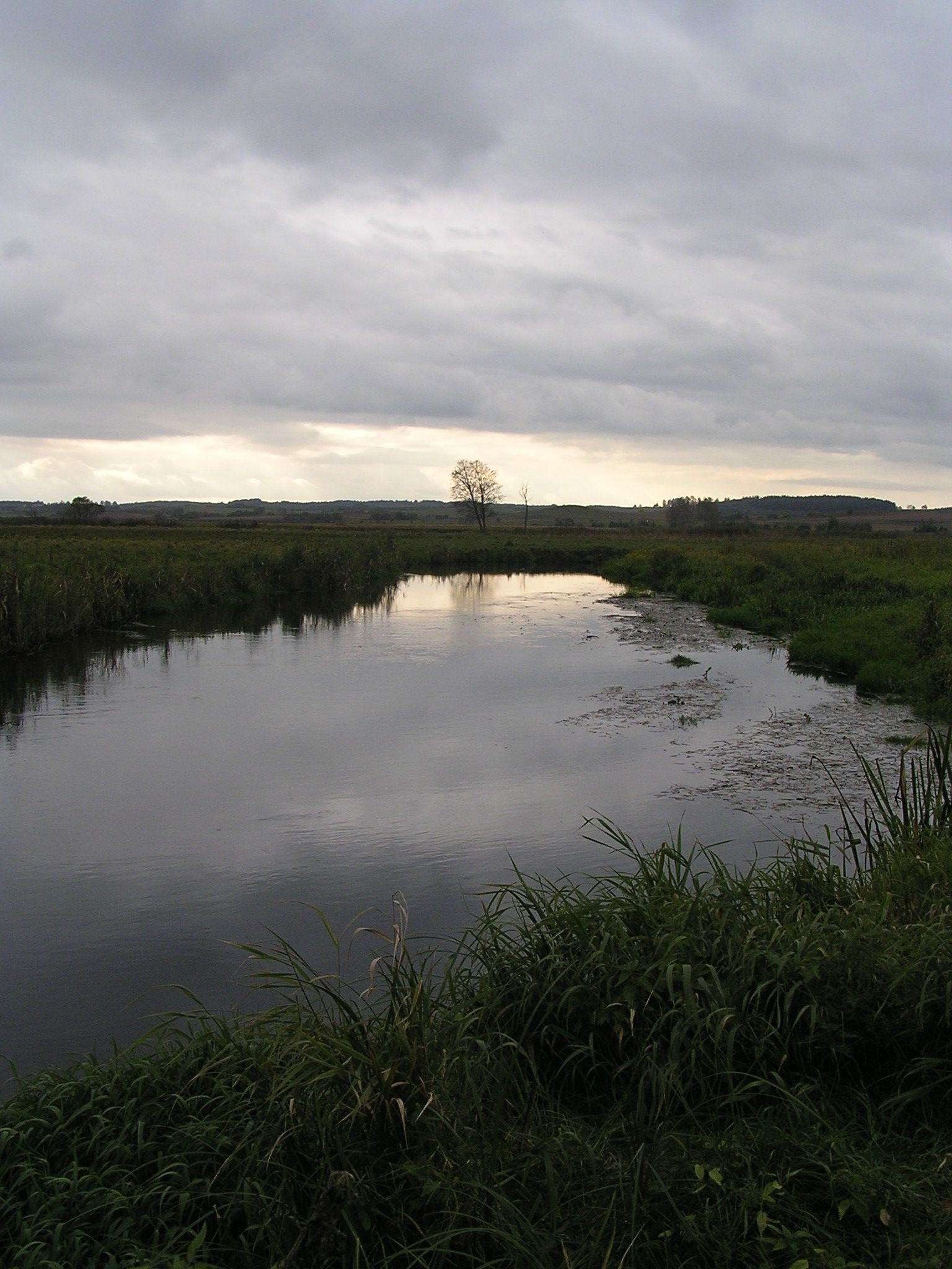 Rzeka Supraśl w okolicy Studzianek